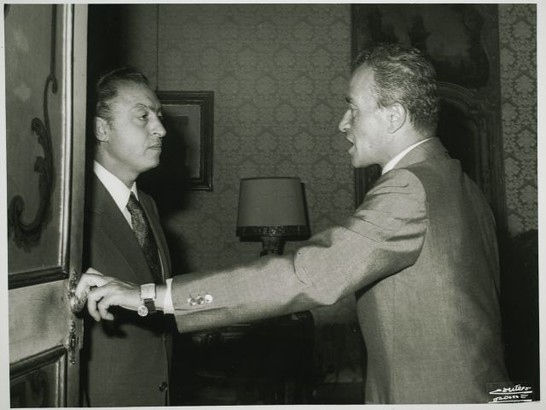 Il presidente della Camera dei Deputati Pietro Ingrao riceve il senatore Mario Valiante